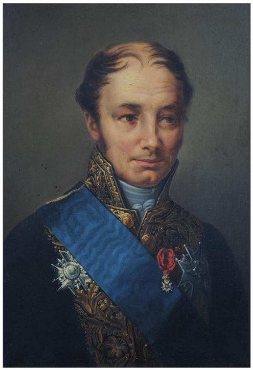 Jacques-Joseph, comte de Corbière.